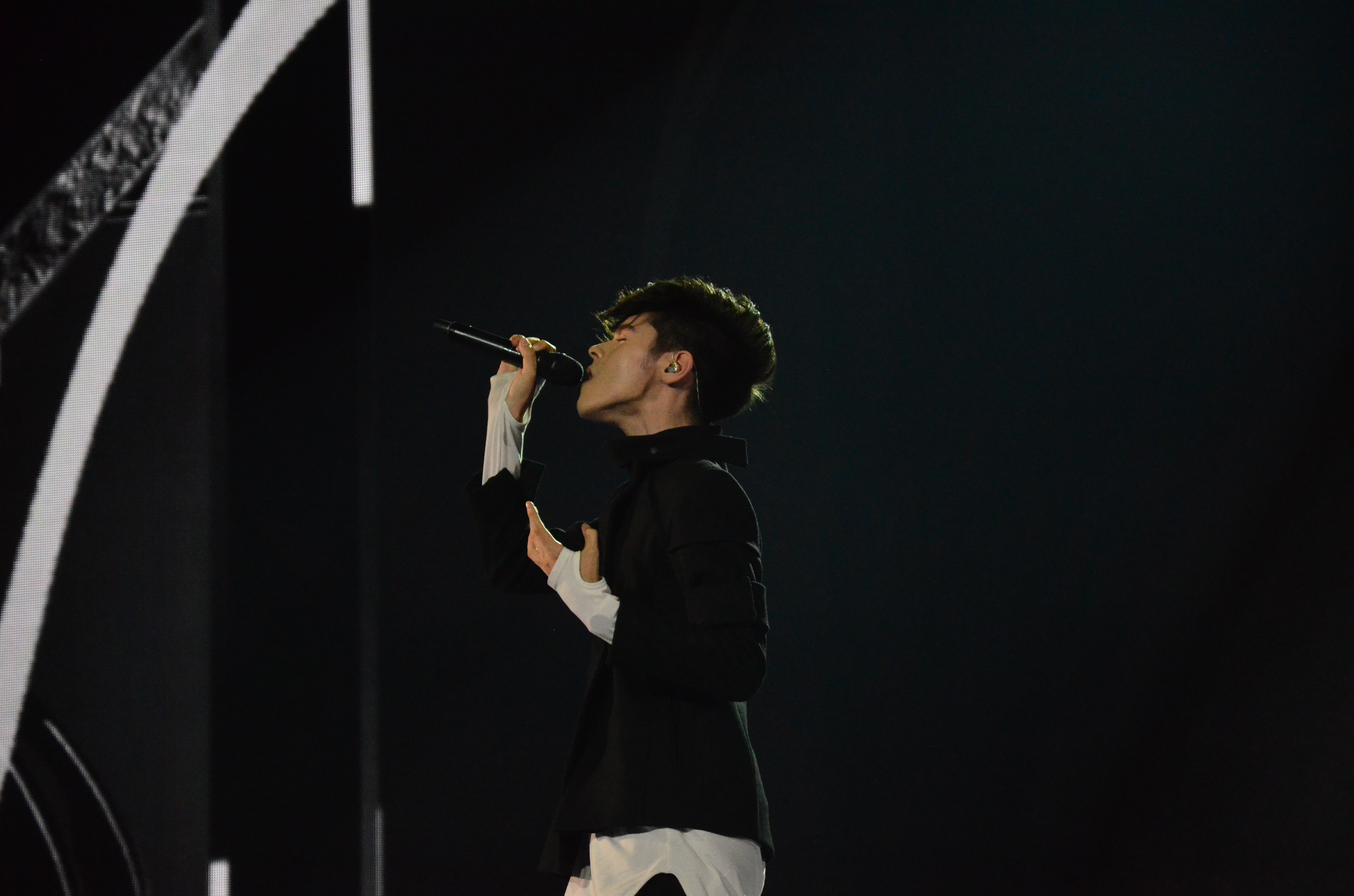 12 травня. Генеральна репетиція фіналу Євробачення 2017. Kristian Kostov (Bulgaria)